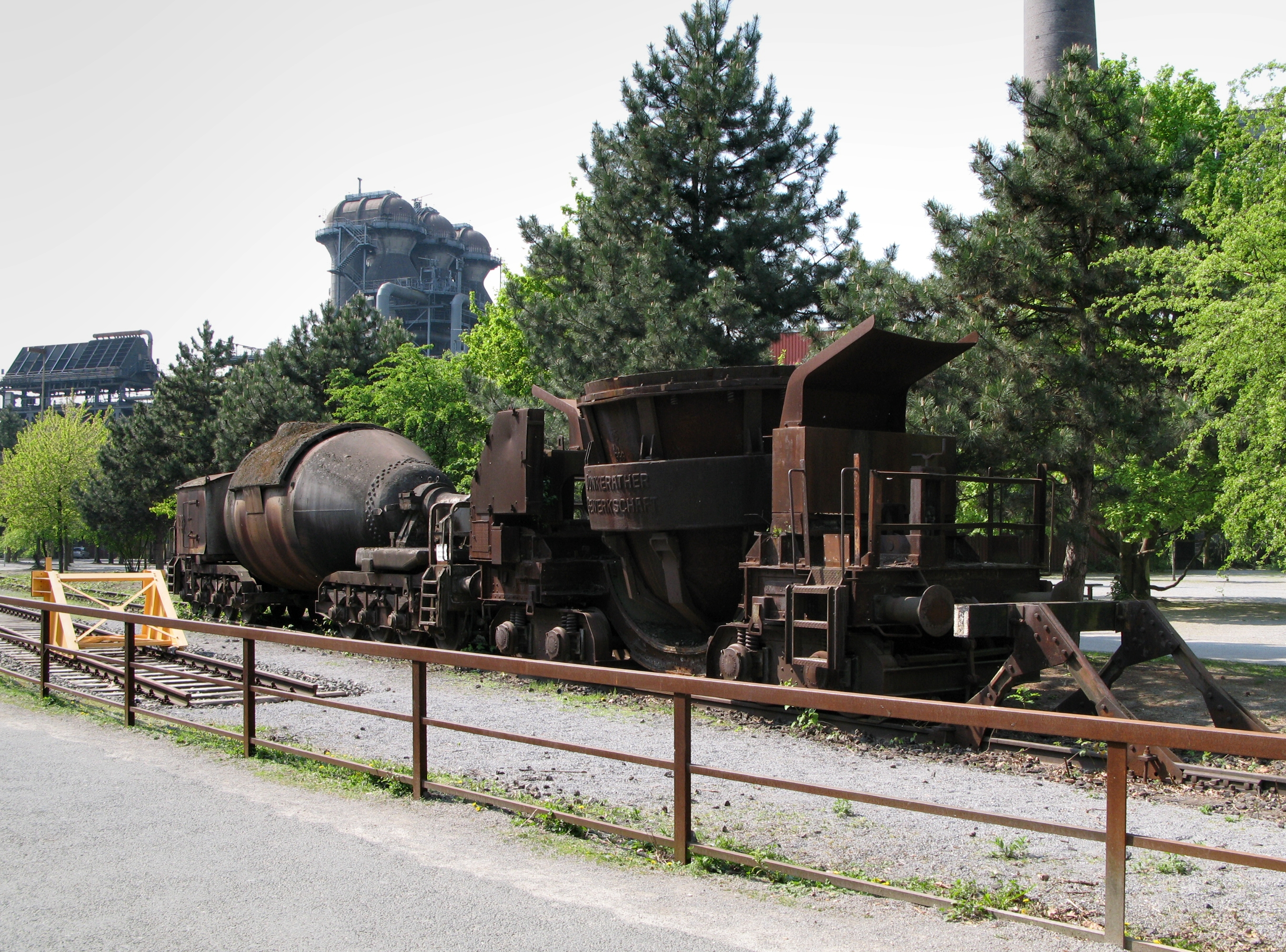 Landschaftspark Duisburg-Nord- Roheisenwaggons